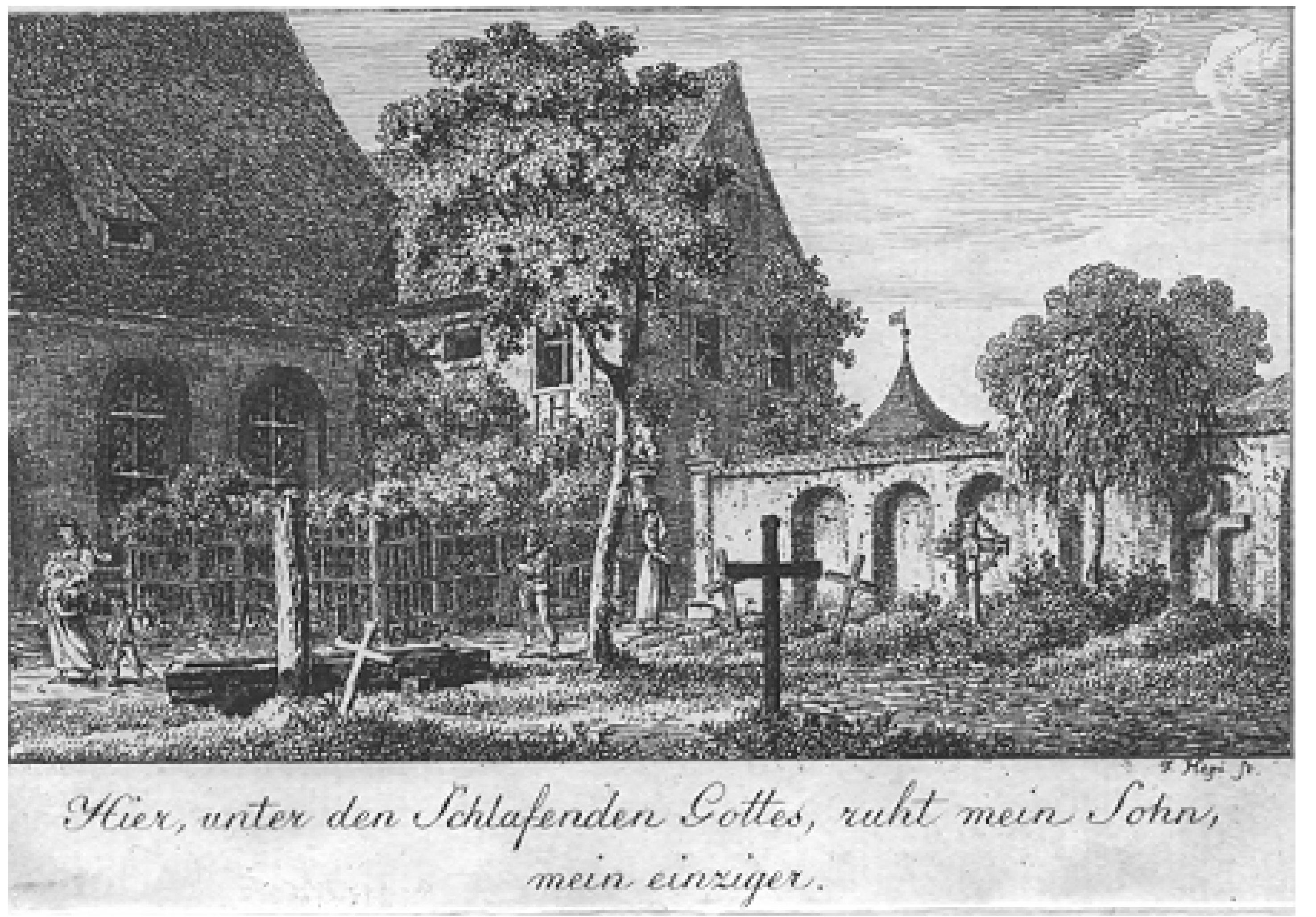 Ansicht des Alten Freiburger Friedhofs ein Kupferstich von Franz Hegi (1774–1850). In: Iris 1813, UB Freiburg: E 5144–11